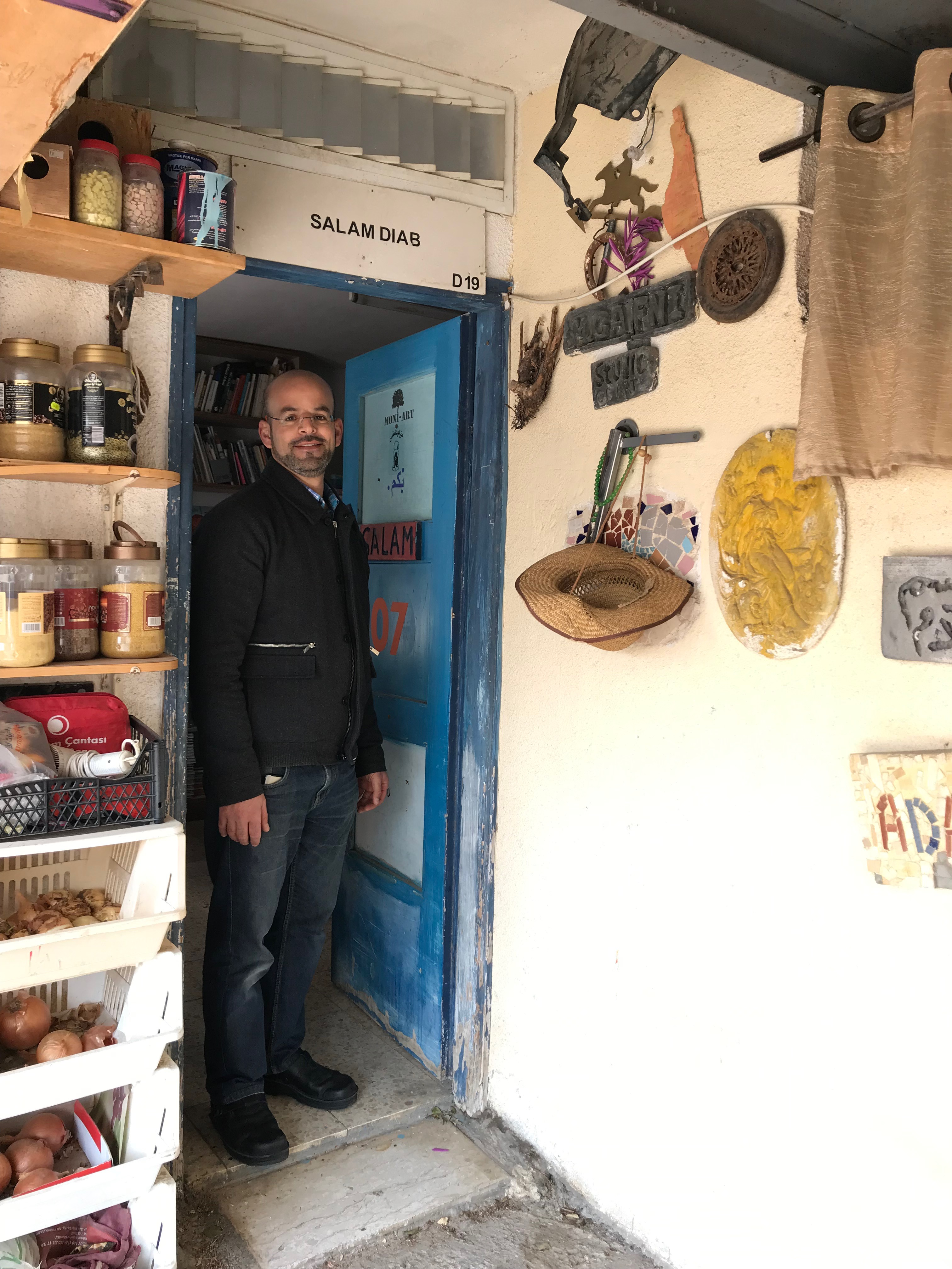 סלאם מוניר דיאב בסטודיו שלו. טמרה 2019